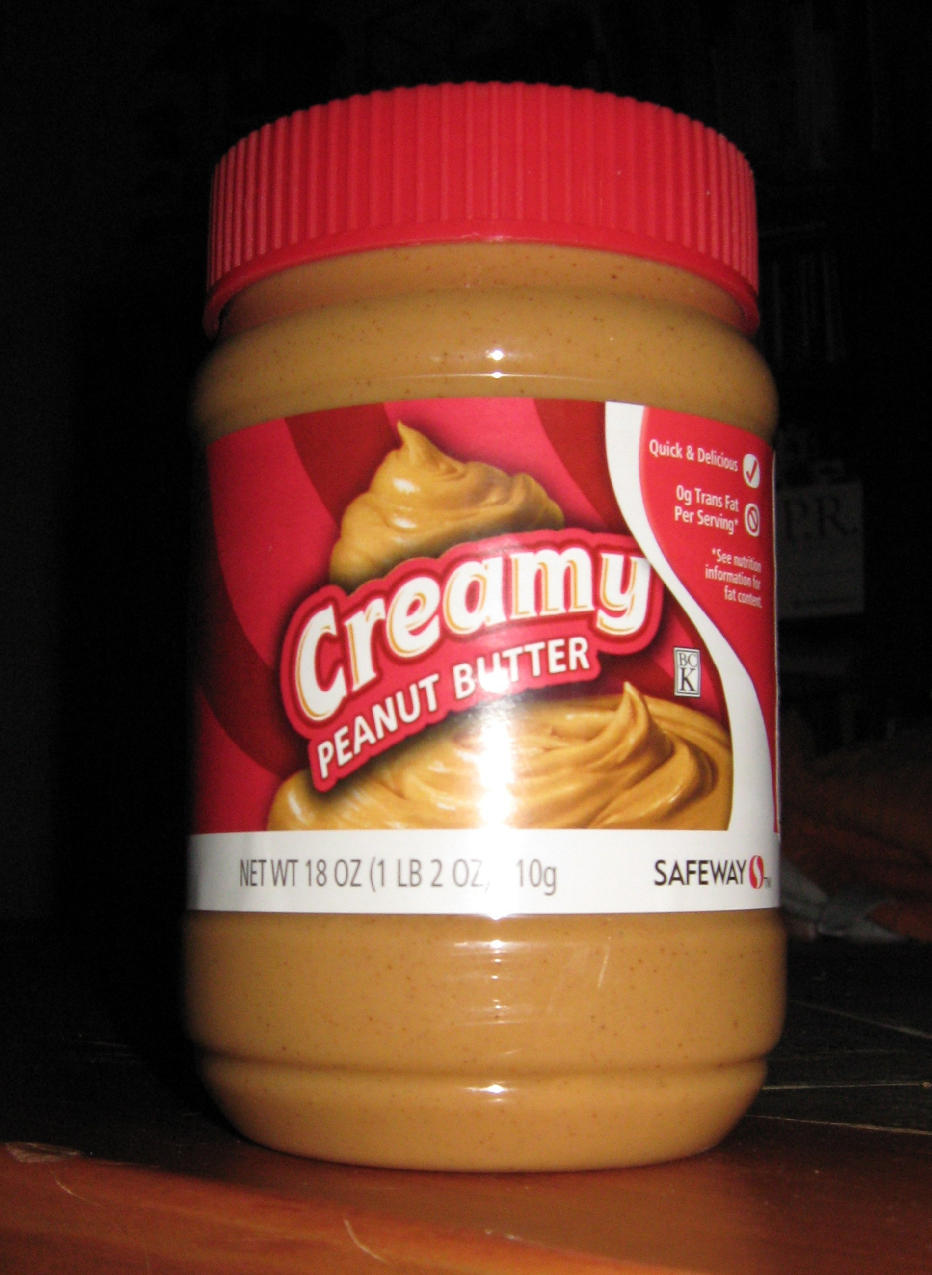 Mantequilla de maní